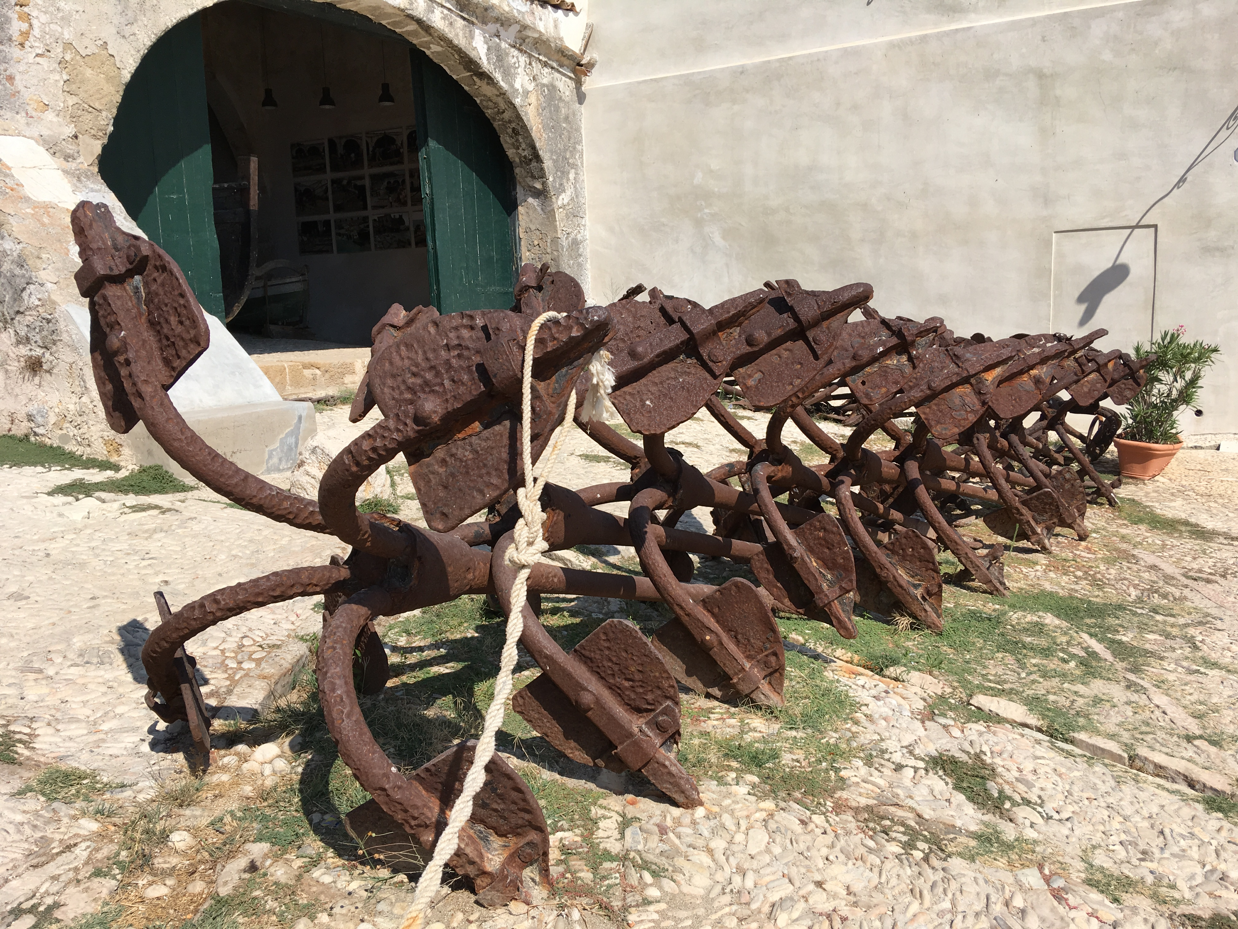 Antiche ancore della Tonnara di Scopello (SICILIA)